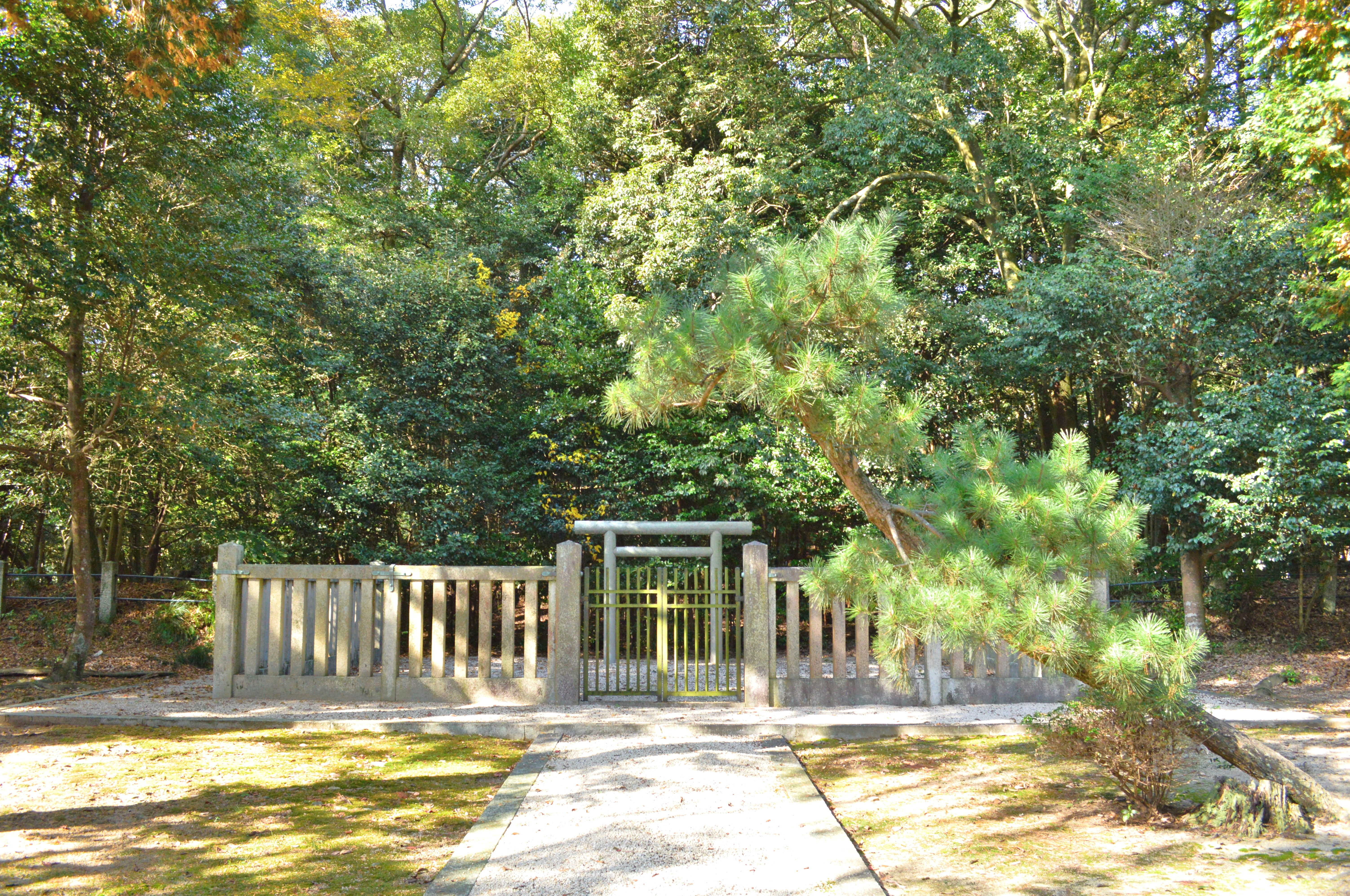 能褒野王塚古墳 日本武尊能褒野墓拝所